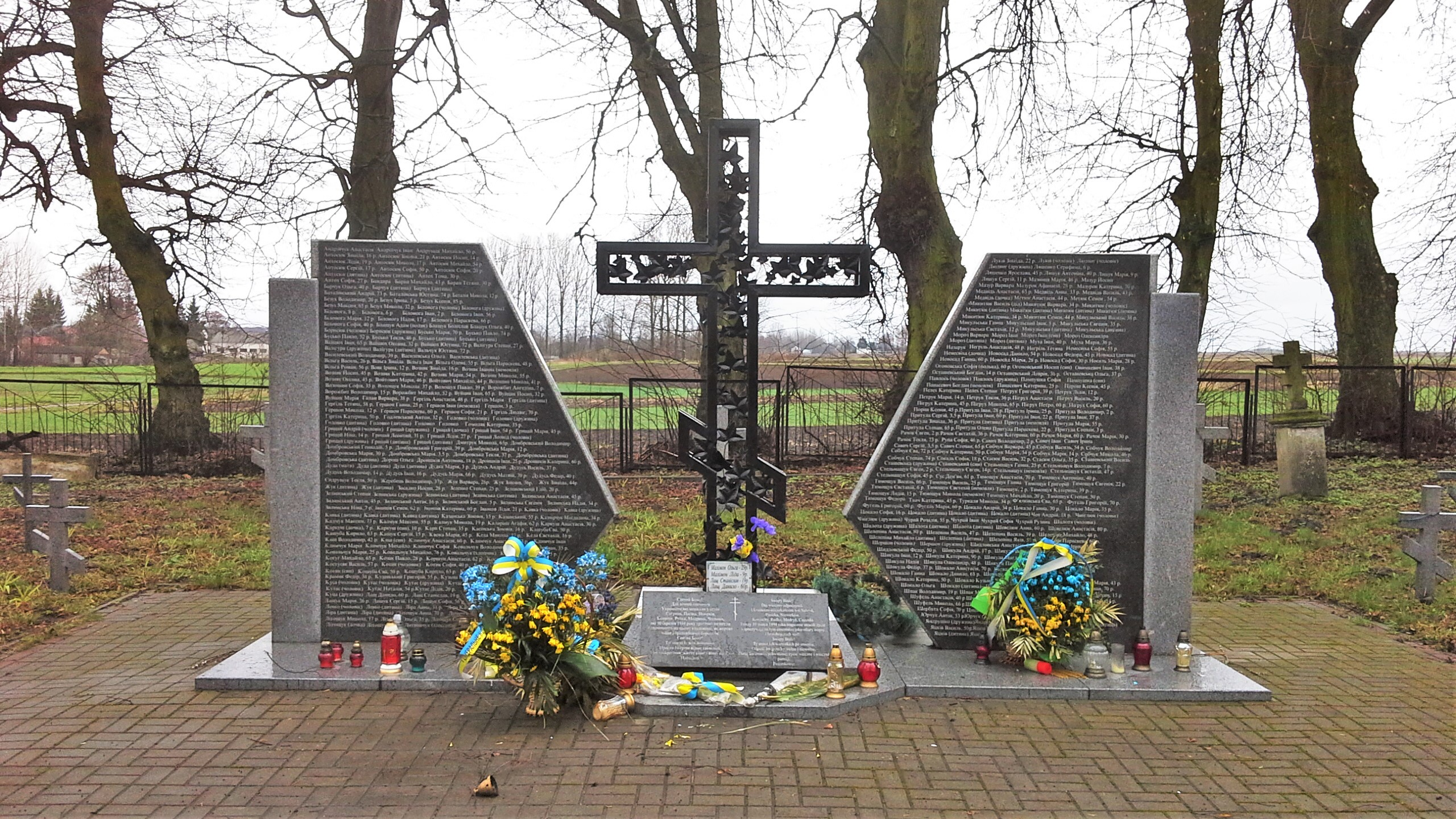 Pomnik Ukraińców z Sahrynia zamordowanych 10 marca 1944 na cmentarzu prawosławnym w Sahryniu